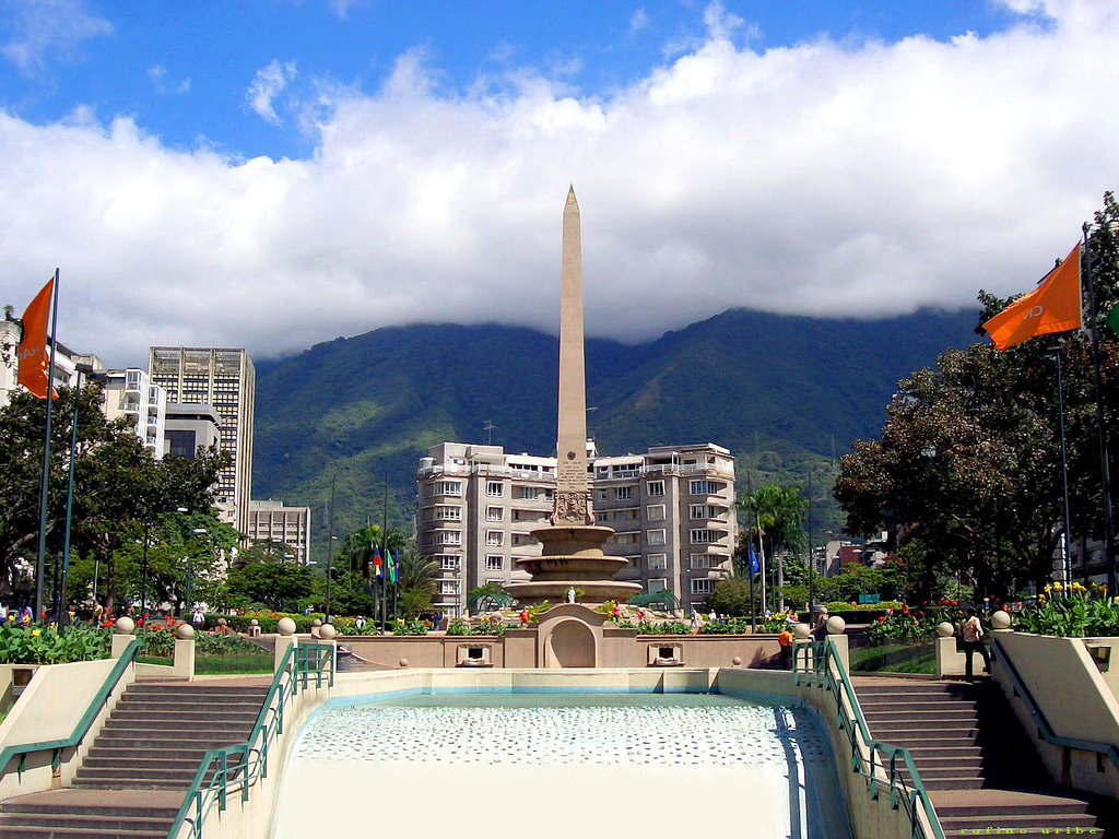 La Plaza Francia (conocida anteriormente como Plaza Altamira) es una plaza de la ciudad de Caracas, capital de Venezuela. Fue construida a principio de la década de 1940 e inaugurada el 11 de agosto de 1945 con el nombre de plaza Altamira. Posteriormente su nombre cambió a Plaza Francia luego de un convenio entre las ciudades de Caracas, y París para tener una plaza Francia en Caracas y una Plaza Venezuela en París. Fue diseñada por el urbanista Luis Roche, dentro del Proyecto de la urbanización Altamira, barrio acomodado del municipio Chacao del Estado Miranda. Destaca en la Plaza, el Obelisco de Altamira, símbolo del Municipio Chacao, el Espejo de Agua y una fuente que cae hacia el fondo de la Plaza que se ha convertido en un Pequeño Centro Comercial y la Principal Salida del Metro de Caracas en la Estación Altamira. Antes de 1940, la zona de Altamira era una hacienda agrícola llamada El Paraiso, de 110 hectáreas, con las grandes quebradas cristalinas Pajaritos, Quebrada Seca y Quintero o quebrada de Chacao, afluentes del río Guaire, que descendían de norte a sur desde la montaña que limita al norte la ciudad de Caracas llamada el Cerro el Ávila. La Plaza Altamira fue concebida como centro de atracción hacia esta nueva urbanización. Por tres de sus lados pasan grandes avenidas. Su obelisco fue en su momento la construcción más alta de la ciudad